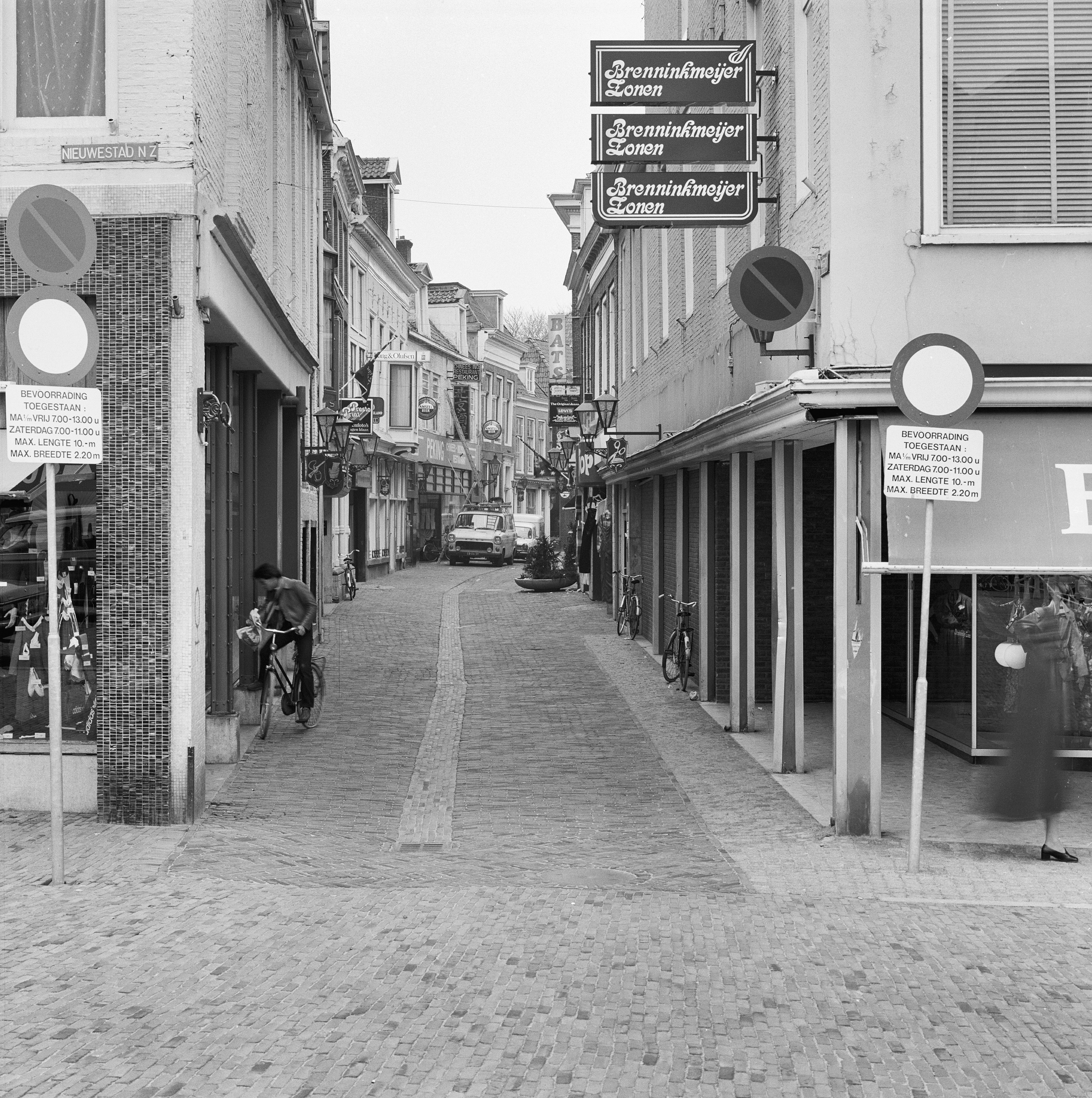 Overzichten: overzicht Weerd